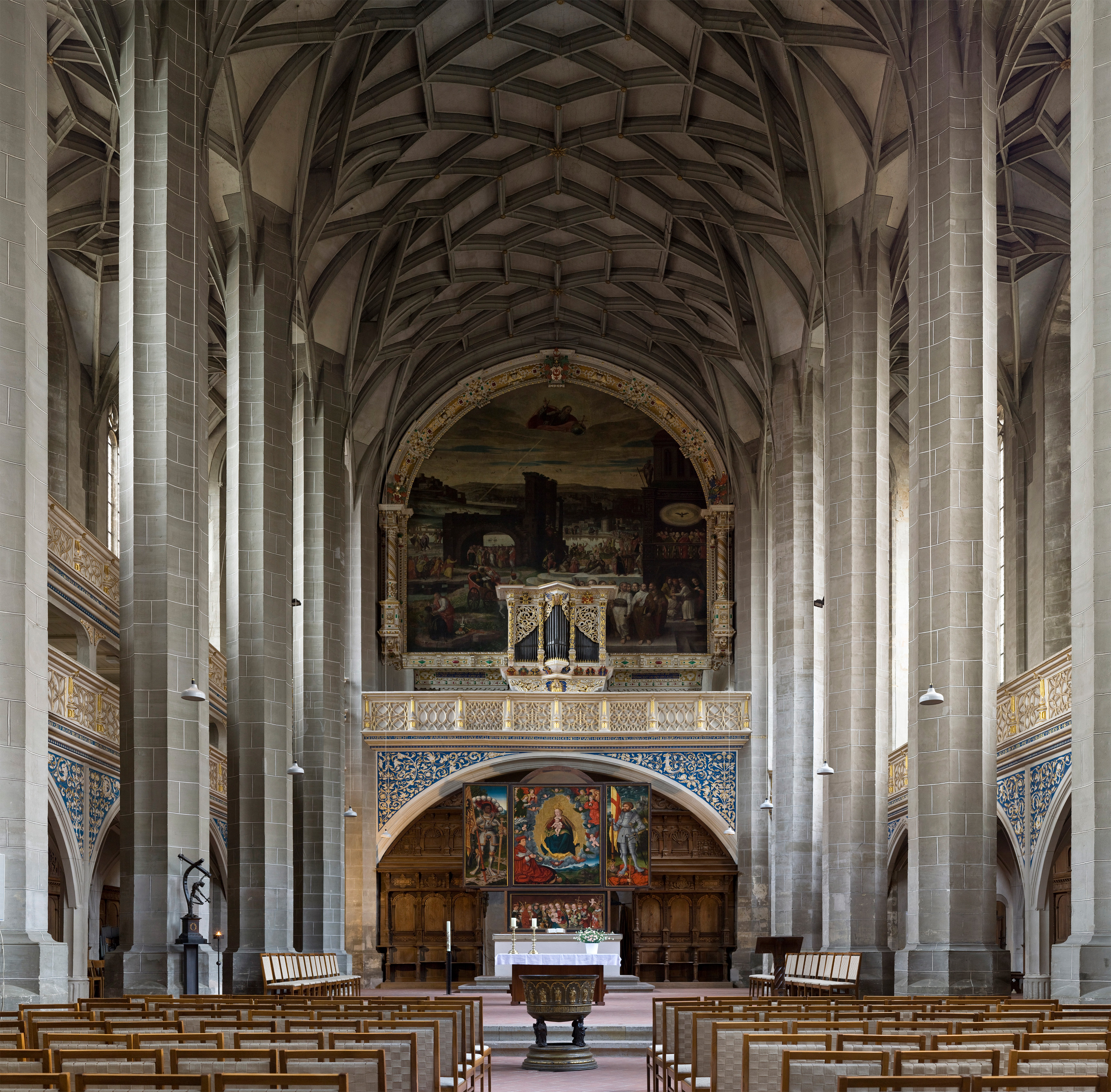 Blick in den Innenraum der Marienkirche in Halle (Saale)